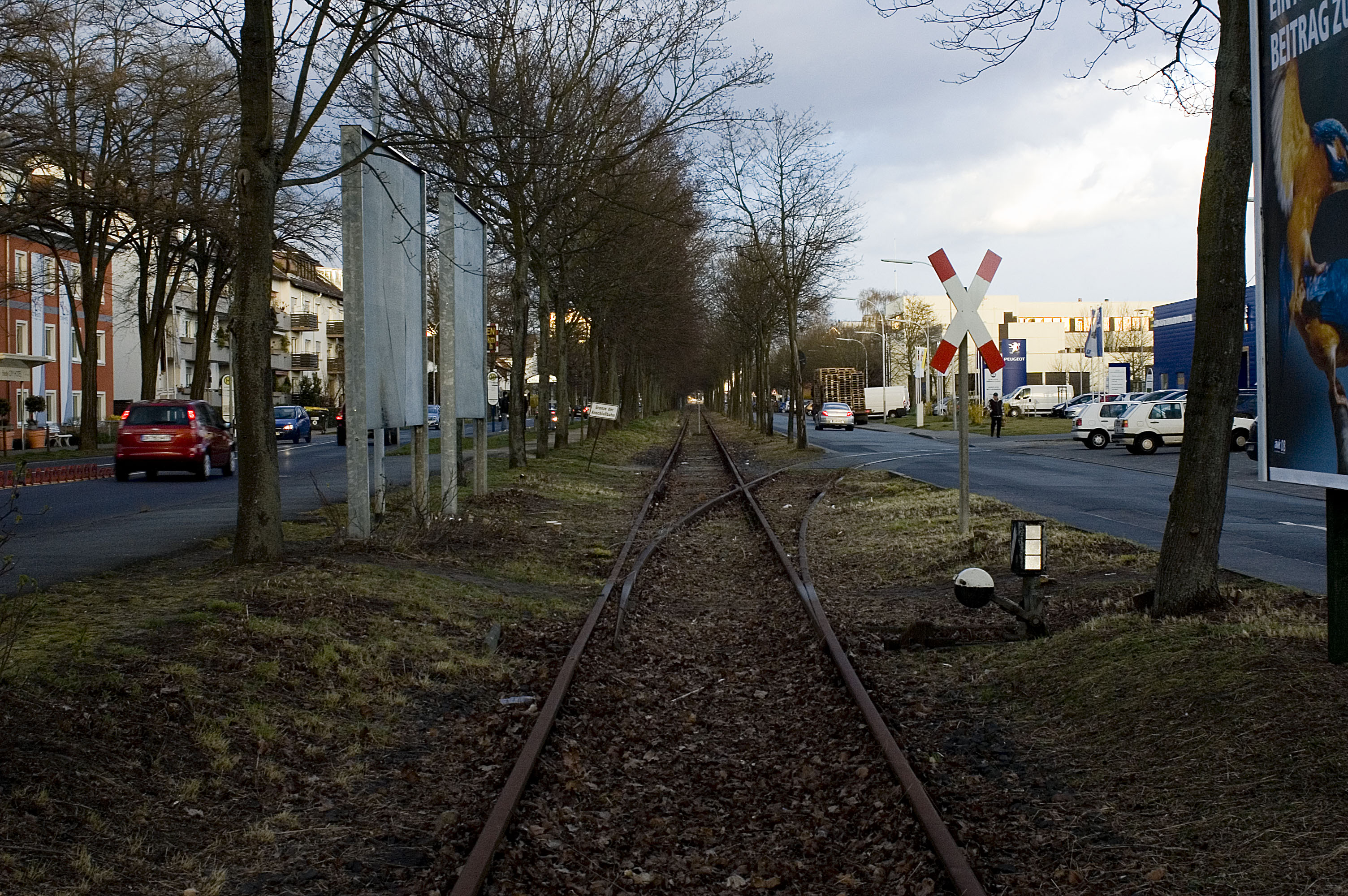 Güterbahnstrecke Main-Neckar-Bahn/Neu-Isenburg Stadt